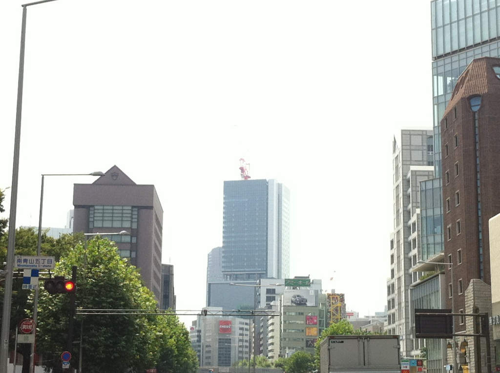 港区南青山５丁目からみた青山通り。右に国連大学、左に青山学院大学、正面に建設中の「渋谷ヒカリエ」がみえる。